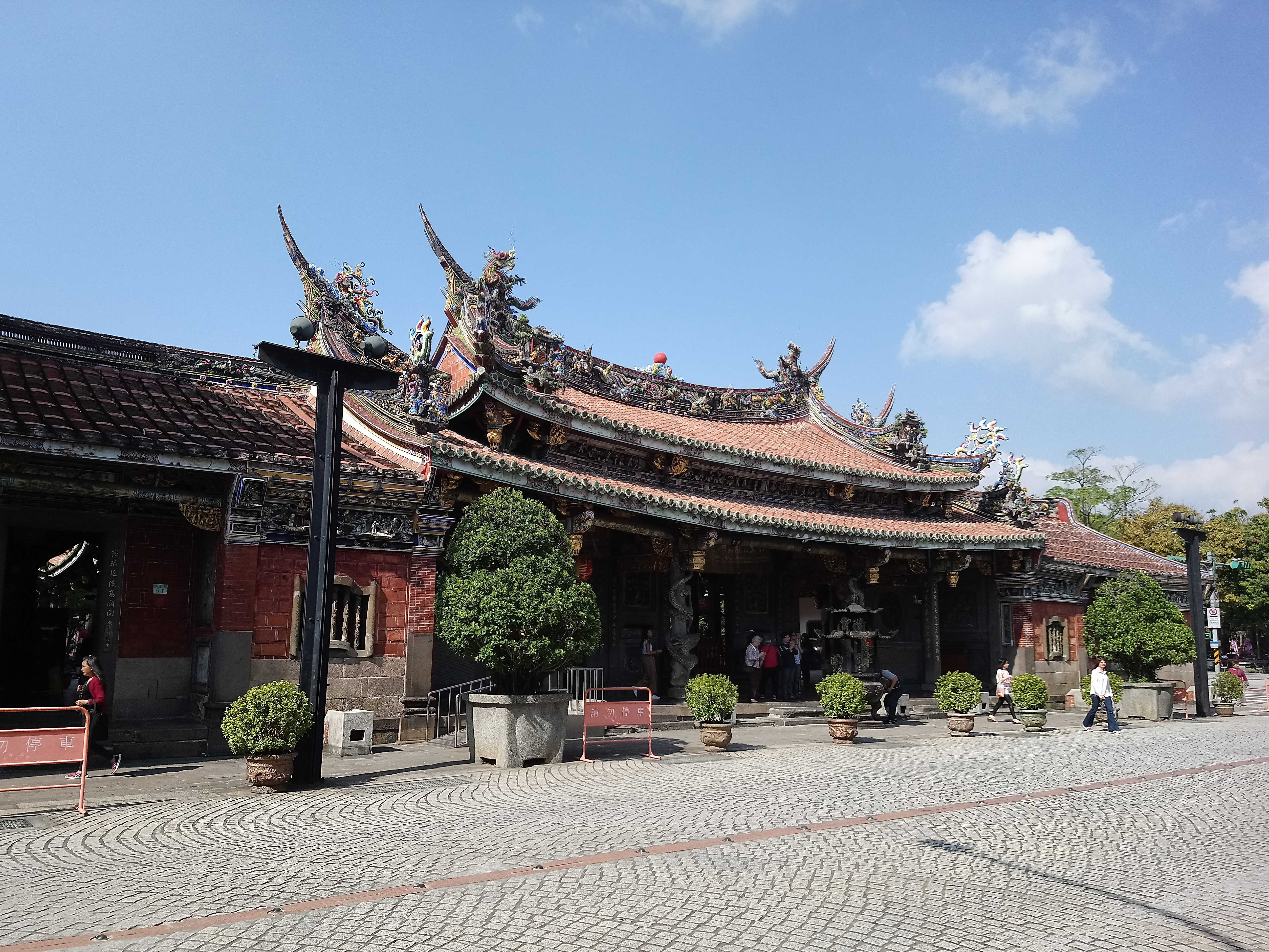 大龍峒保安宮三川殿,臺北市大同區大龍次分區保安里